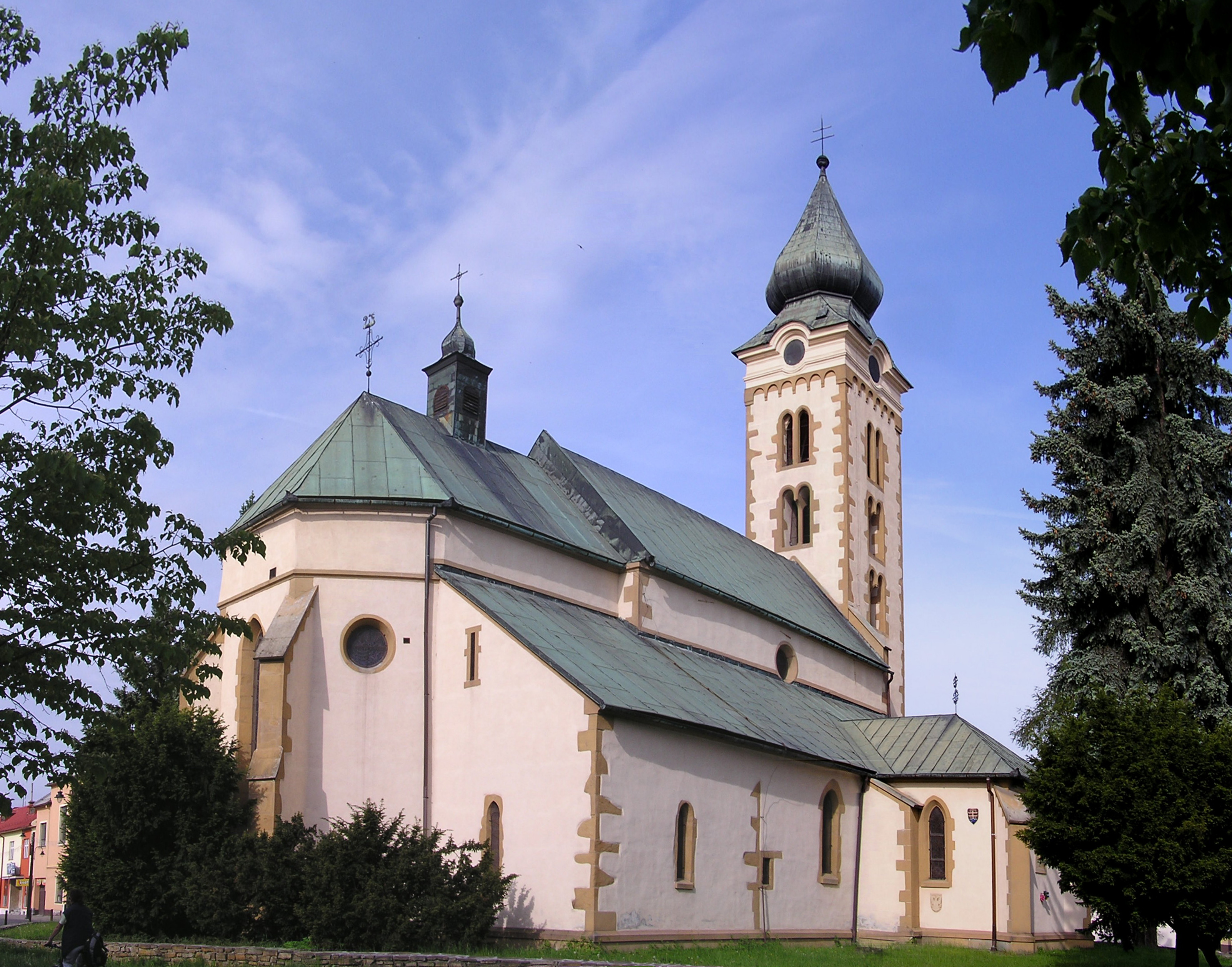 Kostol